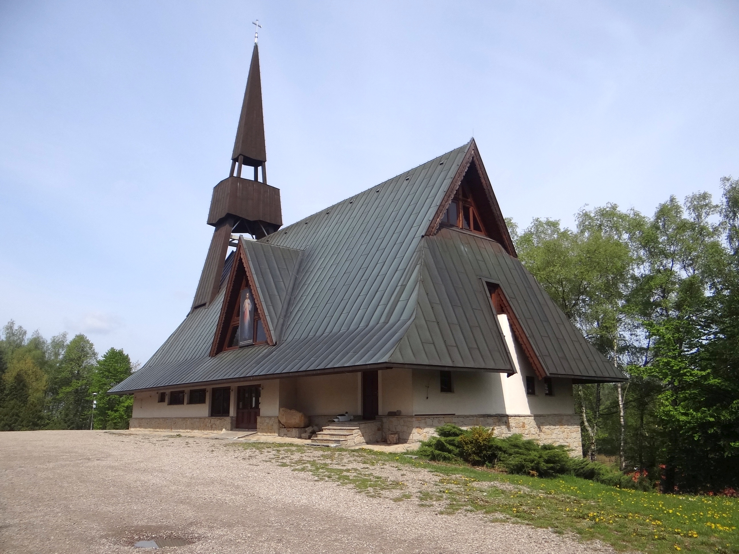 Kościół w Jamnej